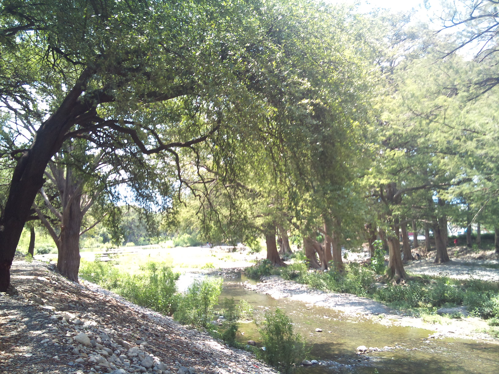 Río La Silla en Guadalupe Nuevo León, a la altura del Parque Zoológico La Pastora